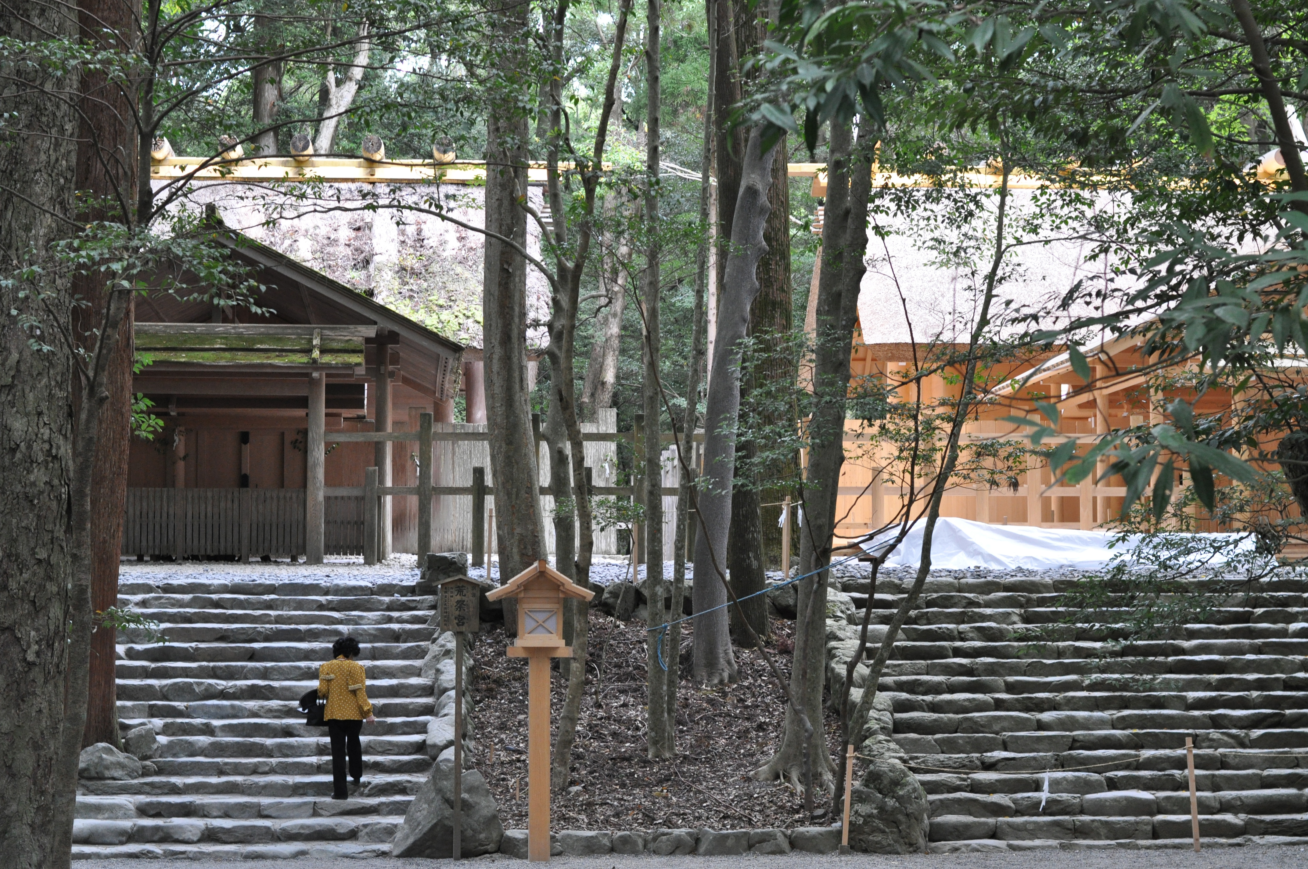 新しい荒祭宮と古い荒祭宮